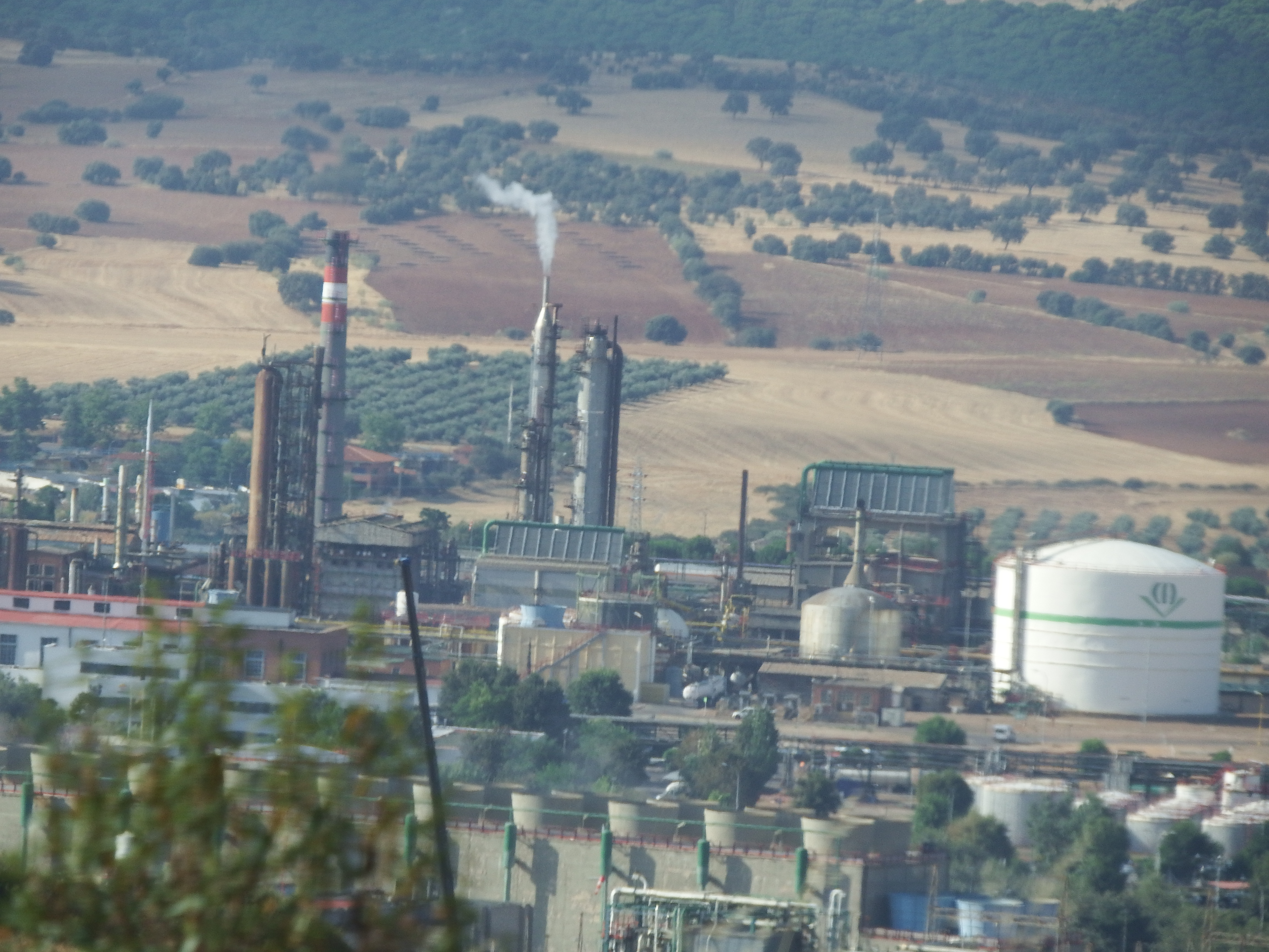 Complejo petroquímico